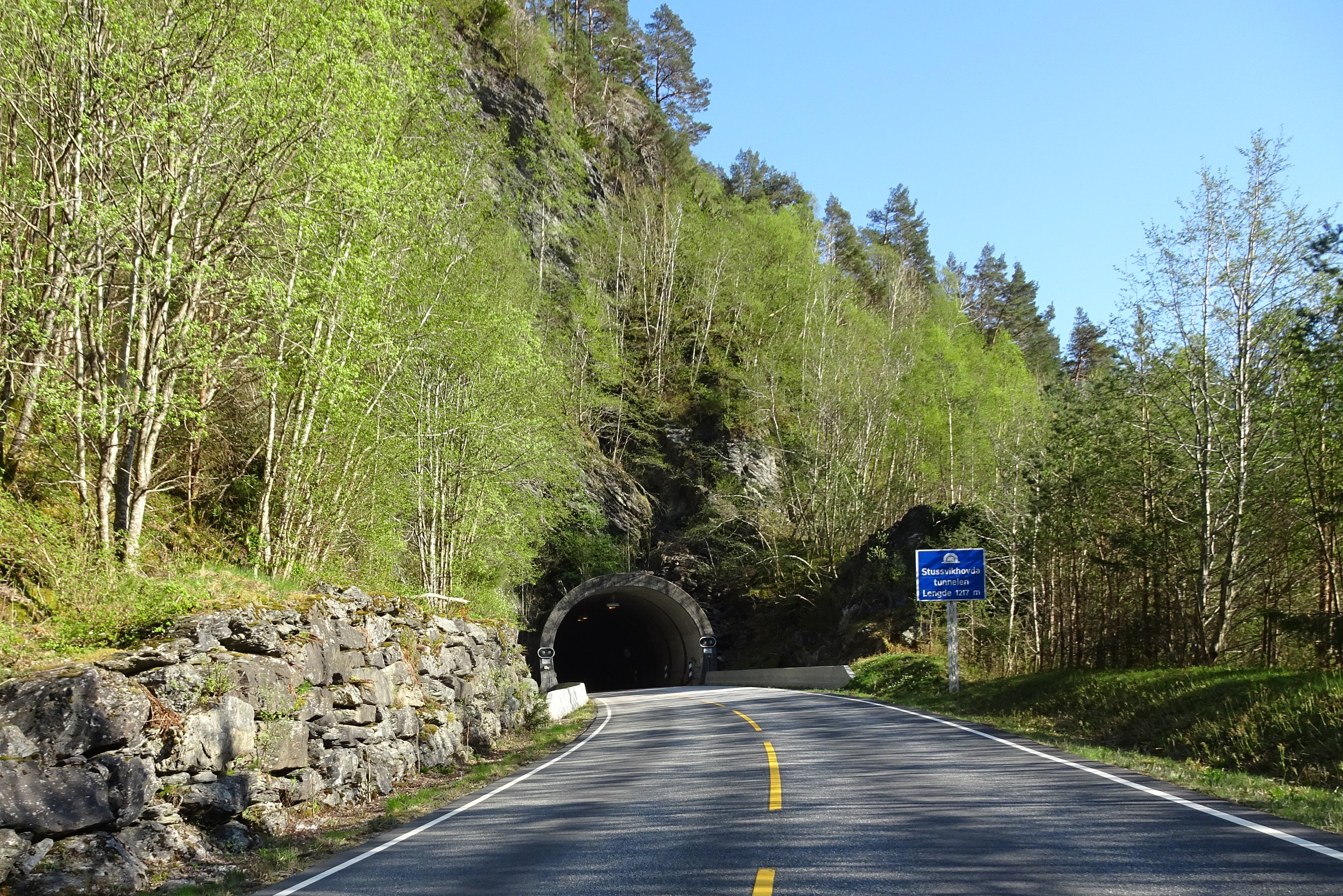 Stussvikhovdatunnelen på primær fylkesvei 49